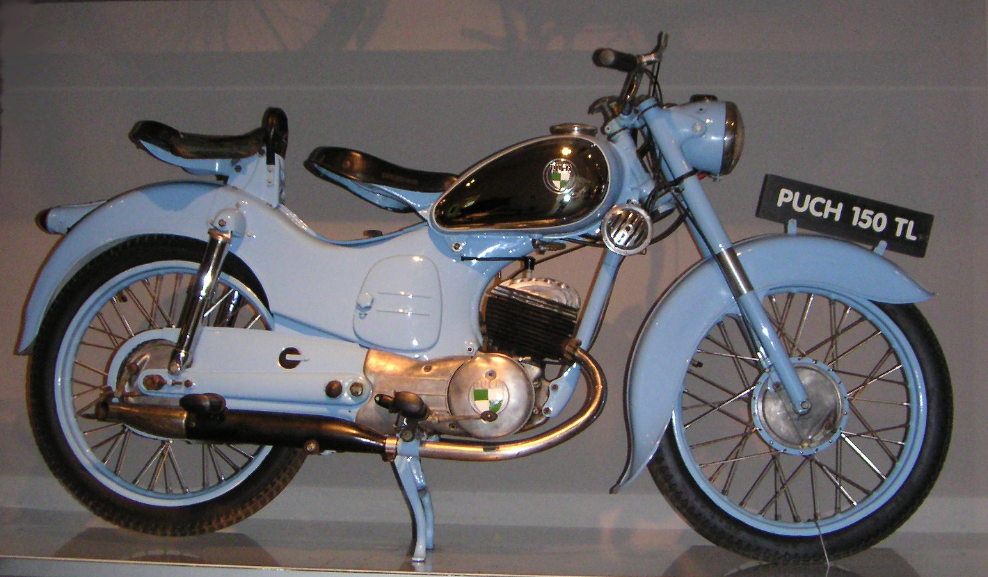 Puch 150 TL, Motorrad, Leistung 6,5 PS Höchstgeschwindigkeit 80km/h, 150 Kubikzentimeter, Drehzahl 5000 U/min, Baujahr vermutlich 1953 fotografiert von Peter Robert Binter im Technischen Museum Wien (Fotografieerlaubnis)